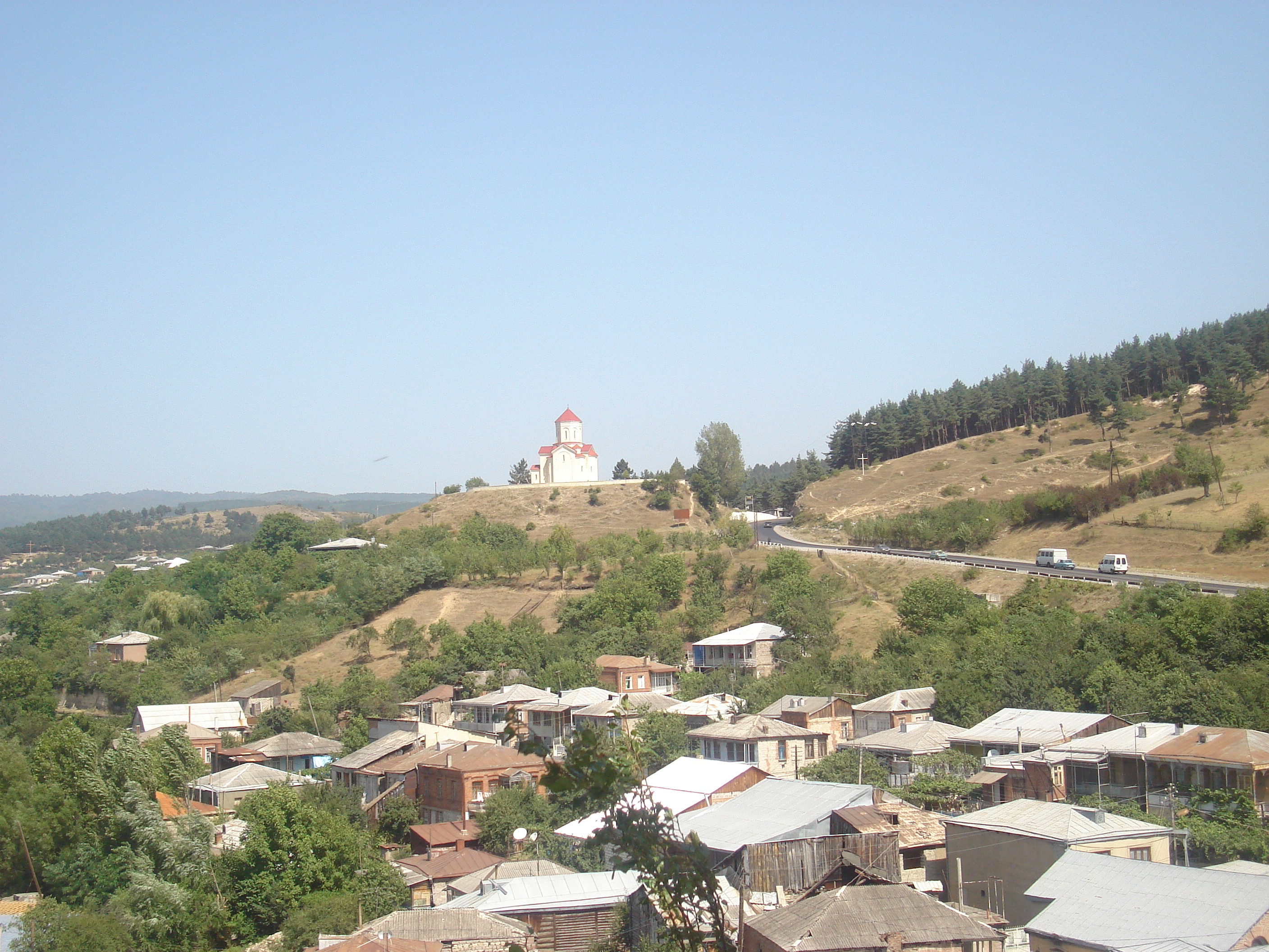 Surami, Georgia